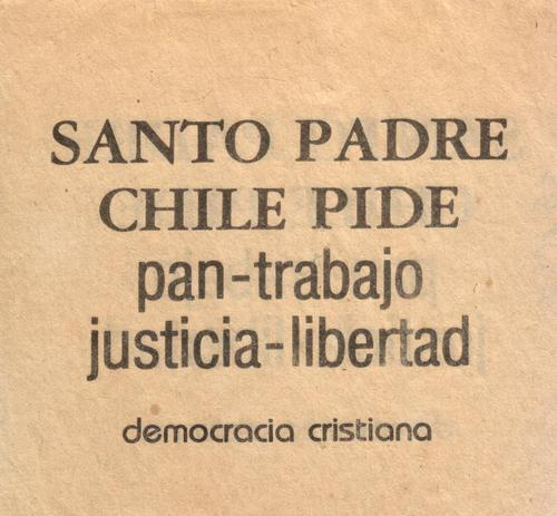 Folleto de la Democracia Cristiana chilena ante la visita de Juan Pablo II a Chile.